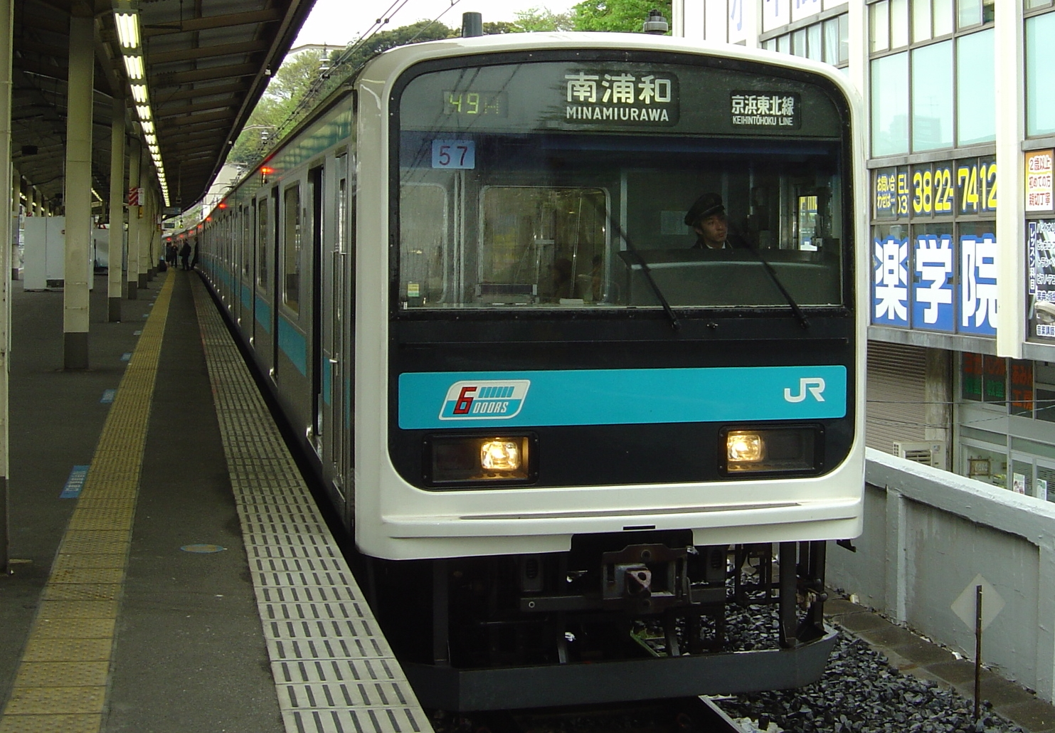 ホーム検知装置、側窓改造工事施工前の浦和電車区209系。 2006年4月20日 西日暮里駅